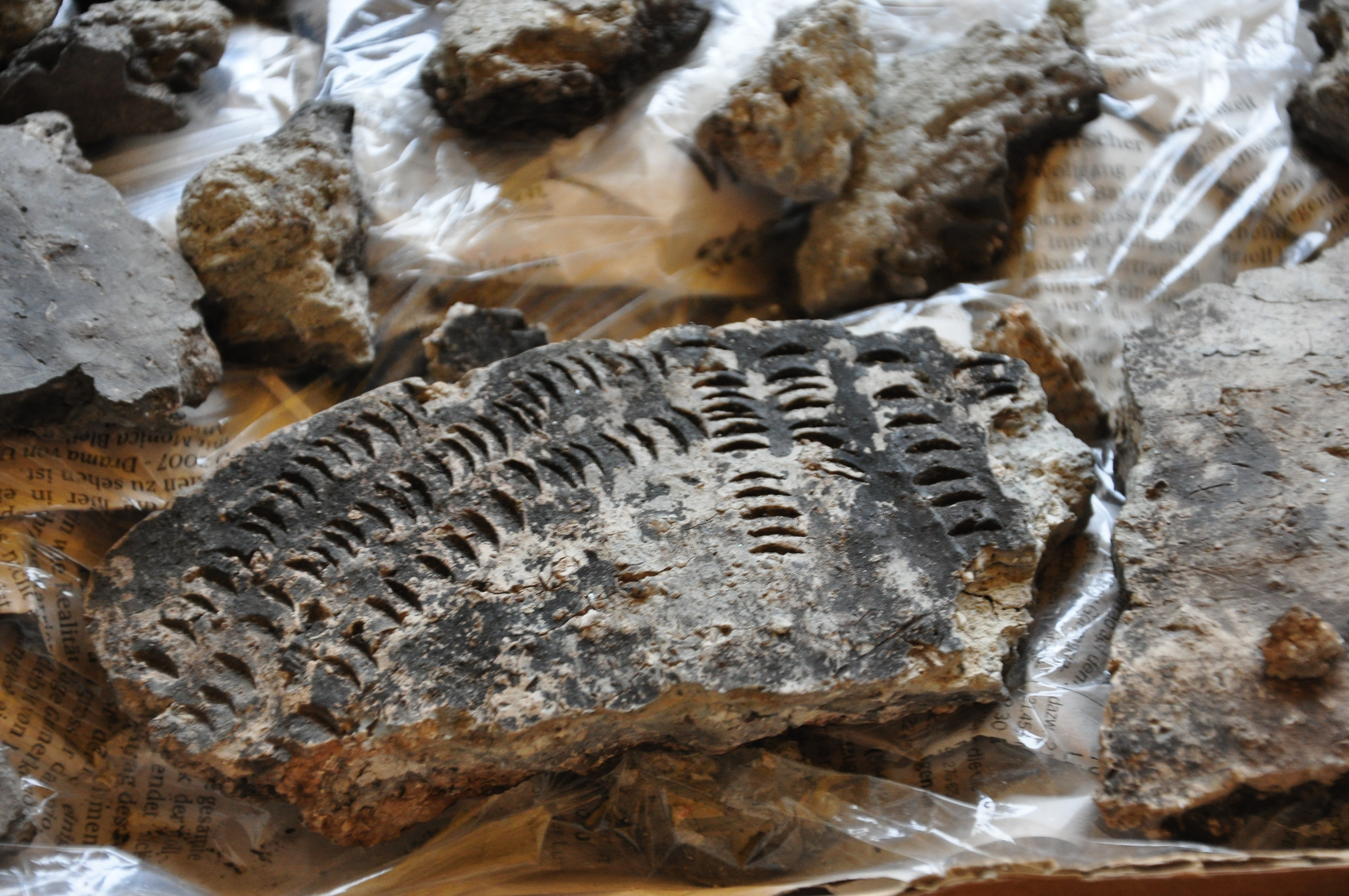 Archäologische Grabung Parkhaus Opéra in Zürich (Switzerland) : Keramikscherben der Horgener Kultur